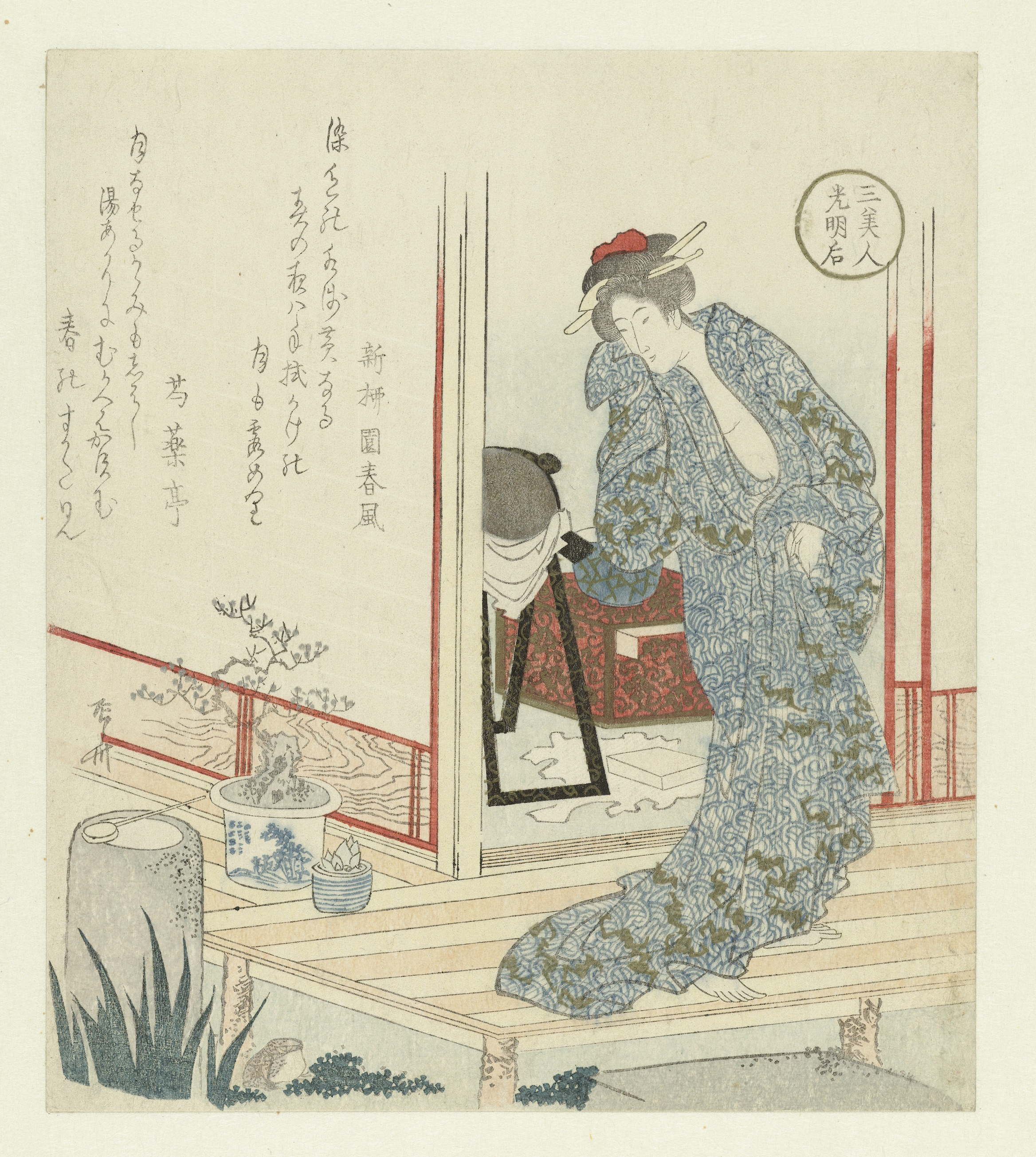 De keizerin Kōmyōgō gehuld in een zomerse kimono (yukata) kijkt naar een grote pad. Kōmyōgō was de vrouw van keizer Shōmu (701-756) en heeft de openbare badhuizen in Japan opgericht. Op een dag werd zij door Buddha getest toen hij voor haar verscheen als een melaatse. De pad refereert naar dit incident. Met twee gedichten. Label Line: mentioned on object Ryūryūkyo Shinsai (ca. 1764 - na 1825), ca. 1820 - ca. 1825, kleurenhoutsnede; blinddruk; lijnblok in zwart met kleurblokken; metaalpigmenten Collection: prenten; Japan (collectie)